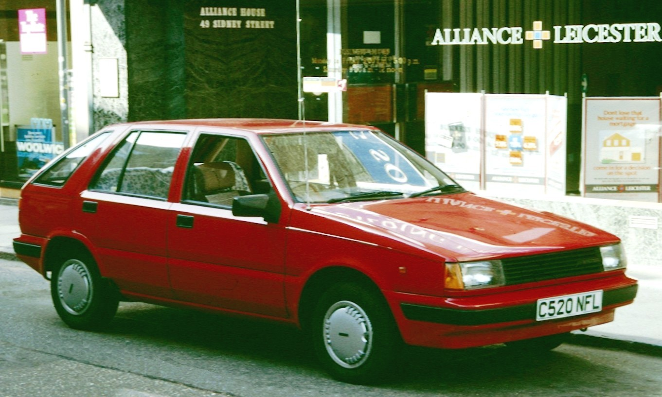 I already uploaded this image, but on the present version I have adjusted the light which, I hope, makes the image more suitable for wiki-use. I've also established from the UK government database certain additional information as follows: Car first registered in UK 31 January 1986 Car not taxed in UK since 01 May 1999 so it may have been destroyed or (less likely) exported or merely left to die. Sad. Year of Manufacture 1986 Cylinder Capacity (cc) 1298CC Vehicle Colour RED